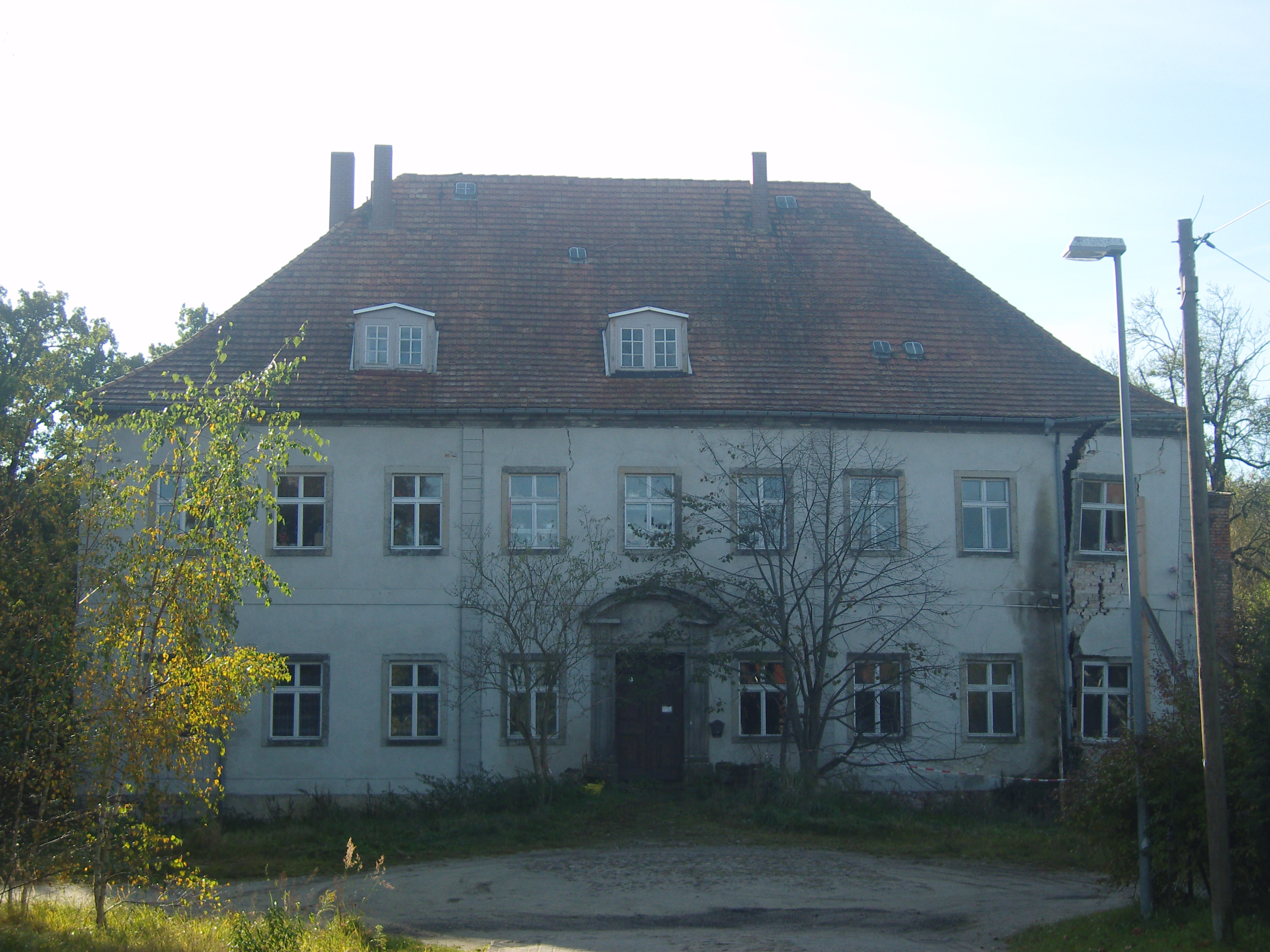 Schloss oder Guts in Neudöbern, Gemeinde Luckaitztal; Baudenkmal